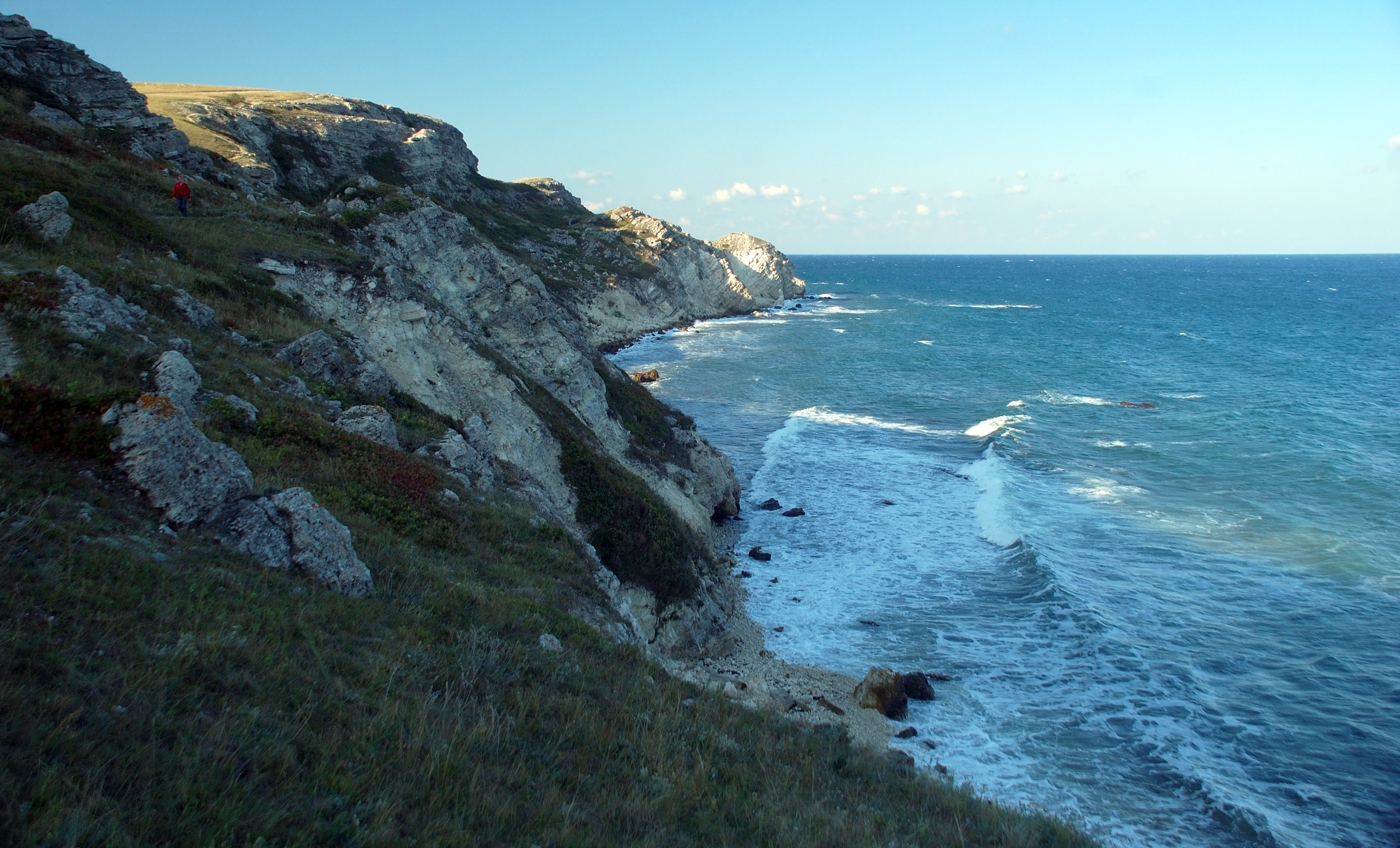 Скалы Джангуля